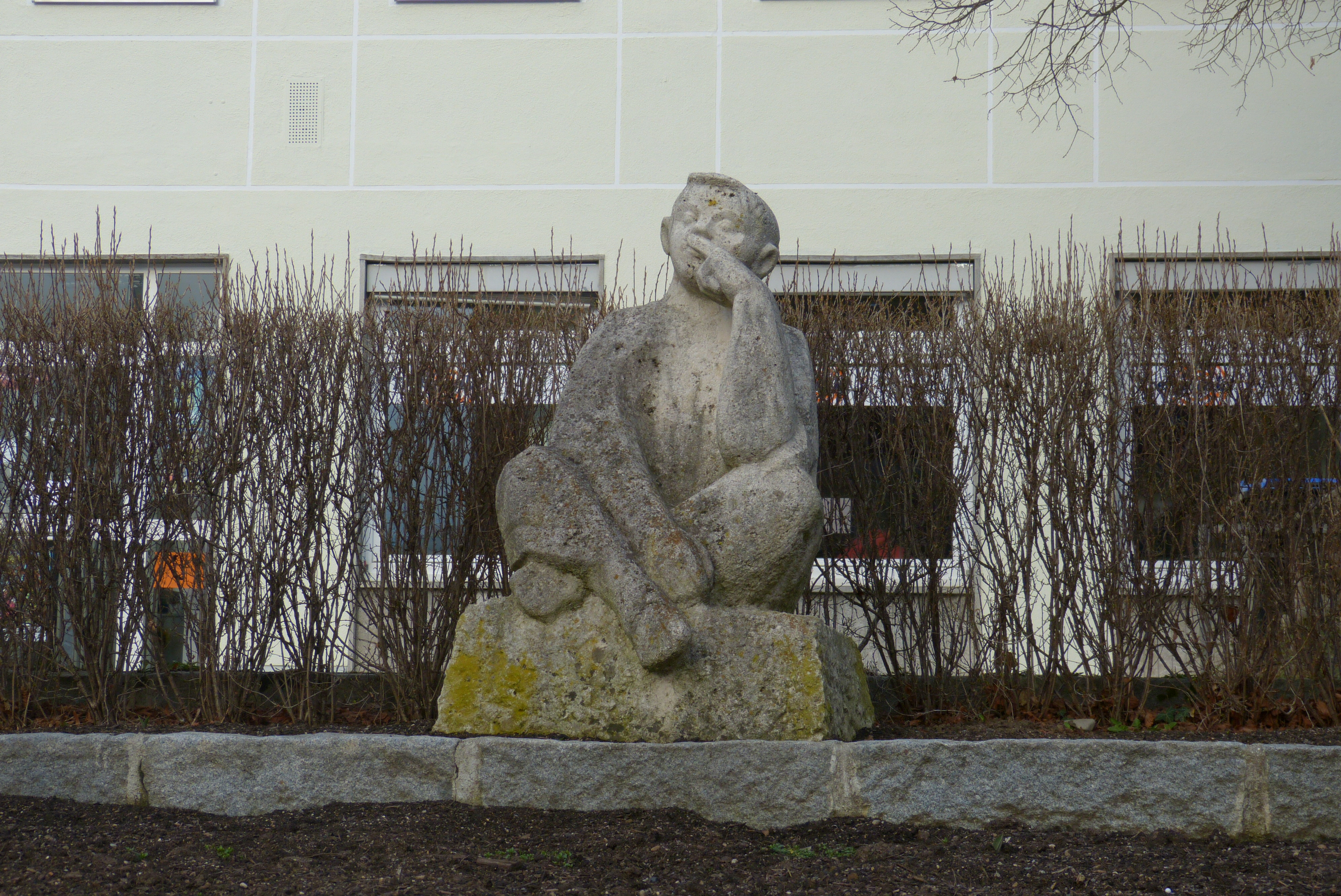 Skulptur des "Bobinger Bübles" von Josef „Sepp“ Mastaller